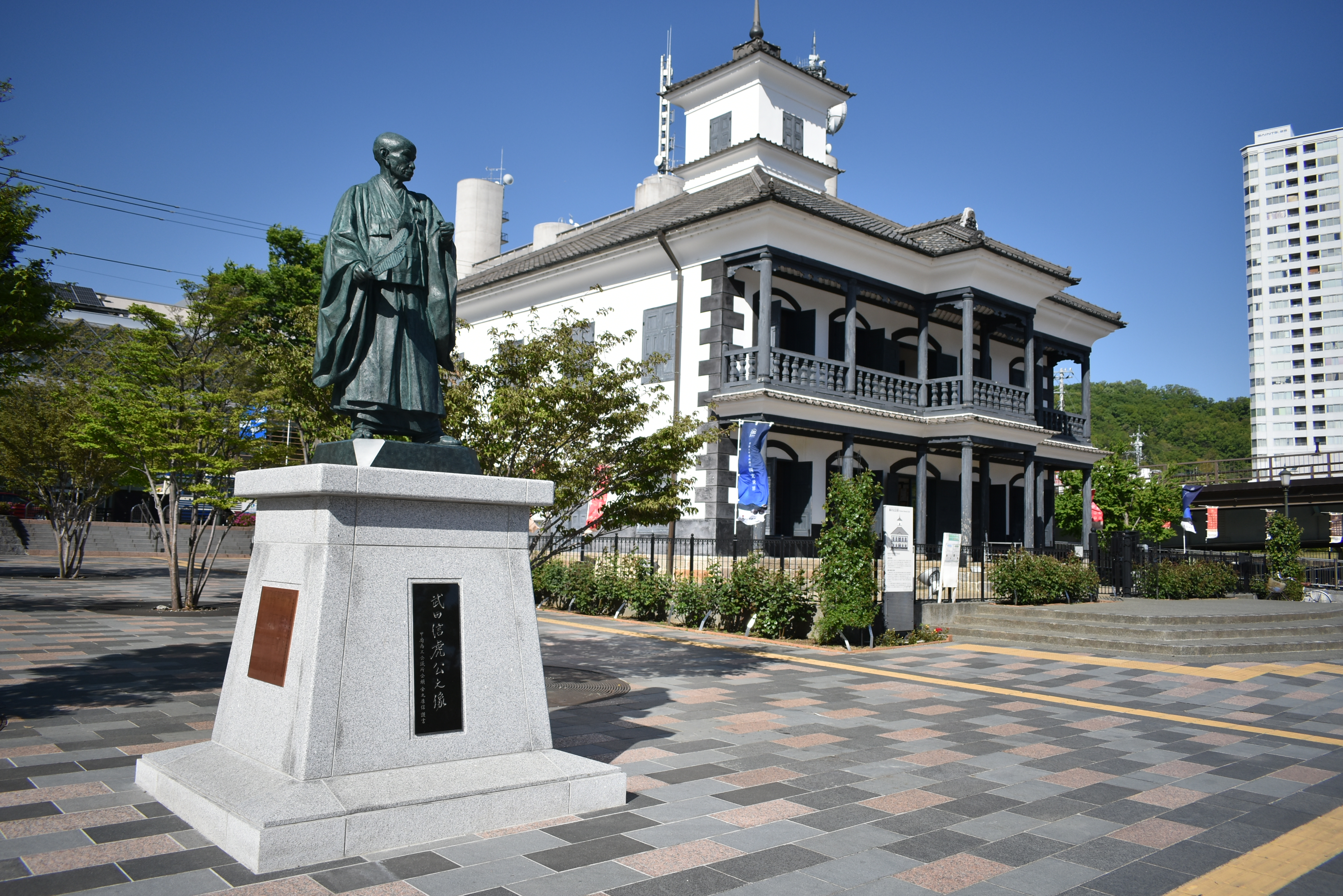 甲府駅 武田信虎像 Nikon D3400